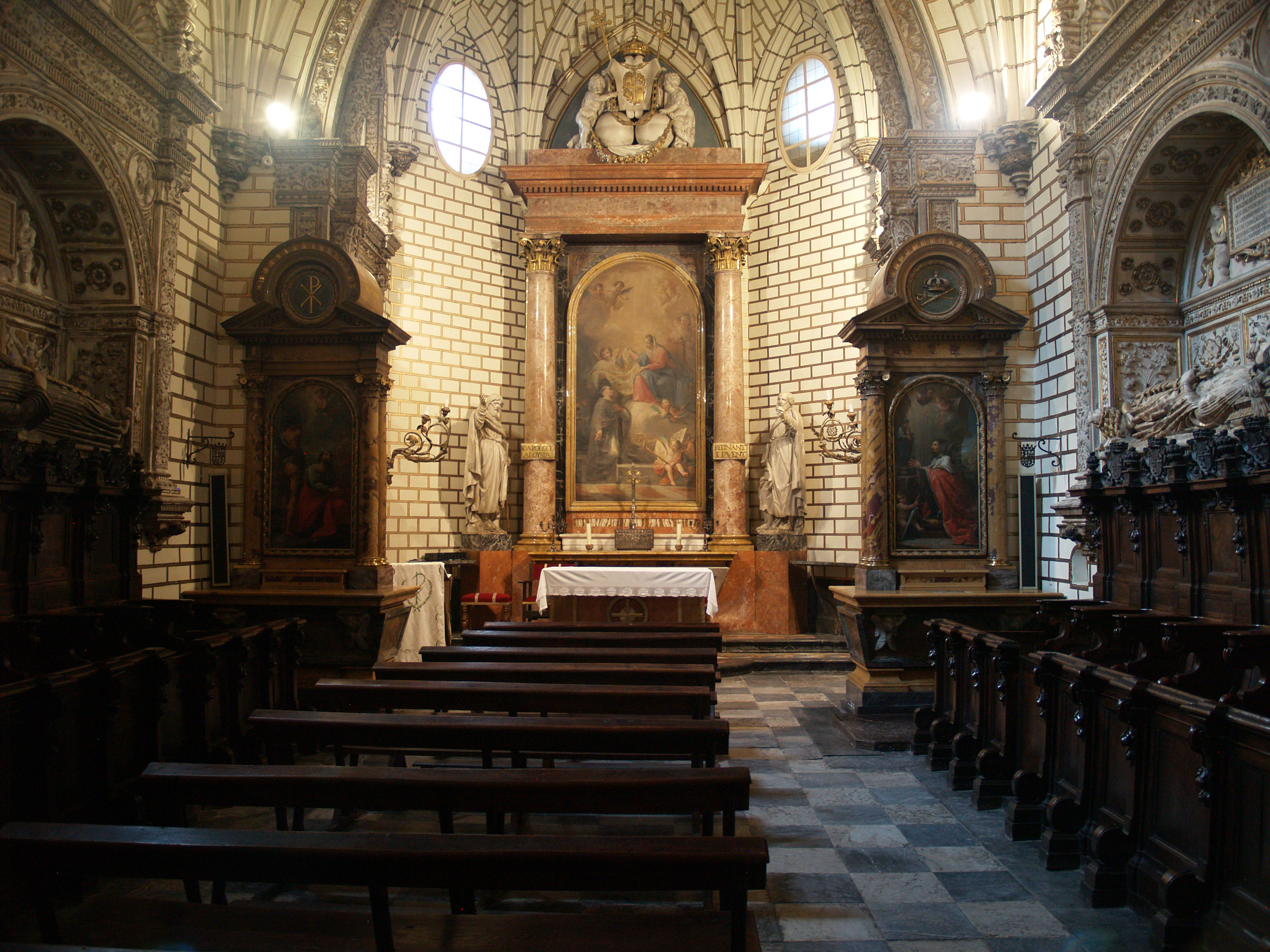 Toledo. Catedral. Capilla de los Reyes Nuevos.